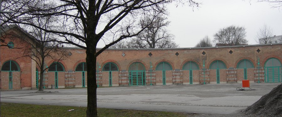 Lokschuppen Rosenheim, linker Bereich